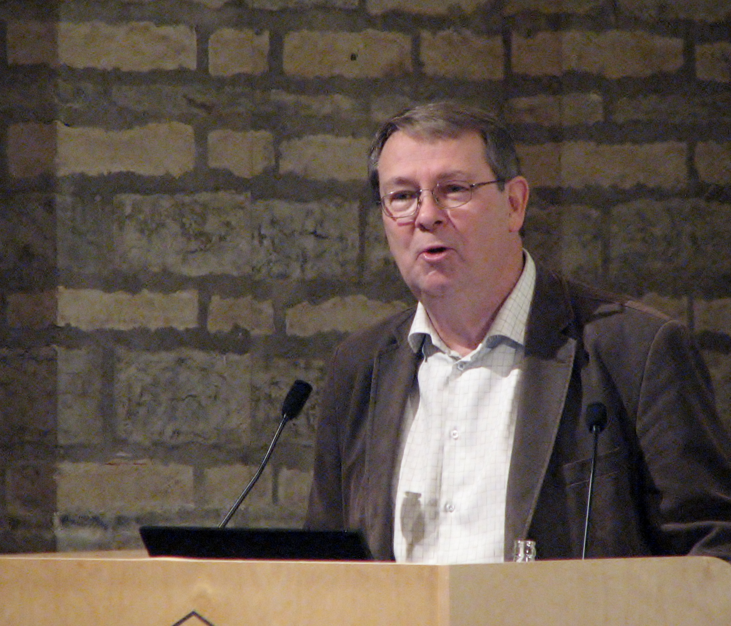 Islandi luuletaja ja tõlkija Hrafn Andrés Harðarson esinemas Eesti Rahvusraamatukogus Põhja- ja Baltimaade kirjandusfoorumil